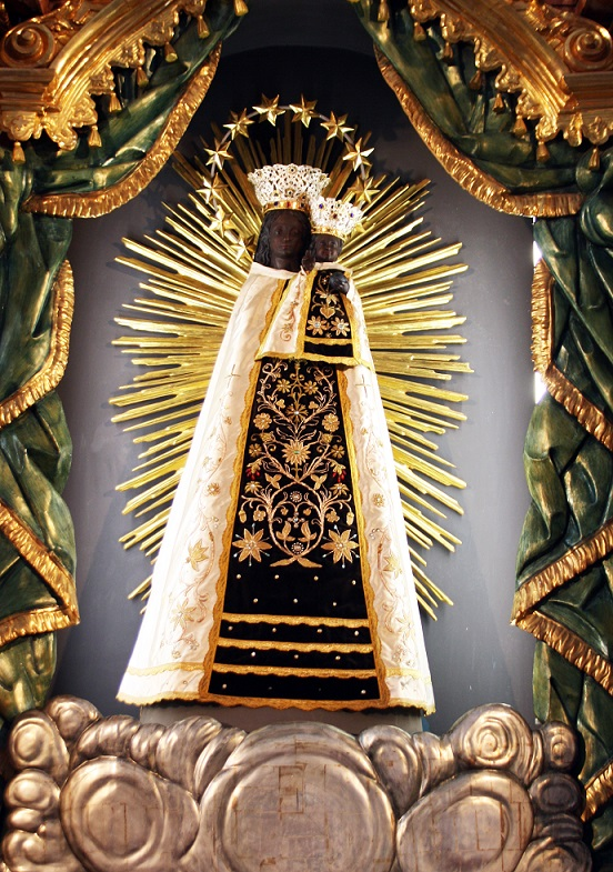 Gnadenbild in der Pfarrkirche Bodenmais